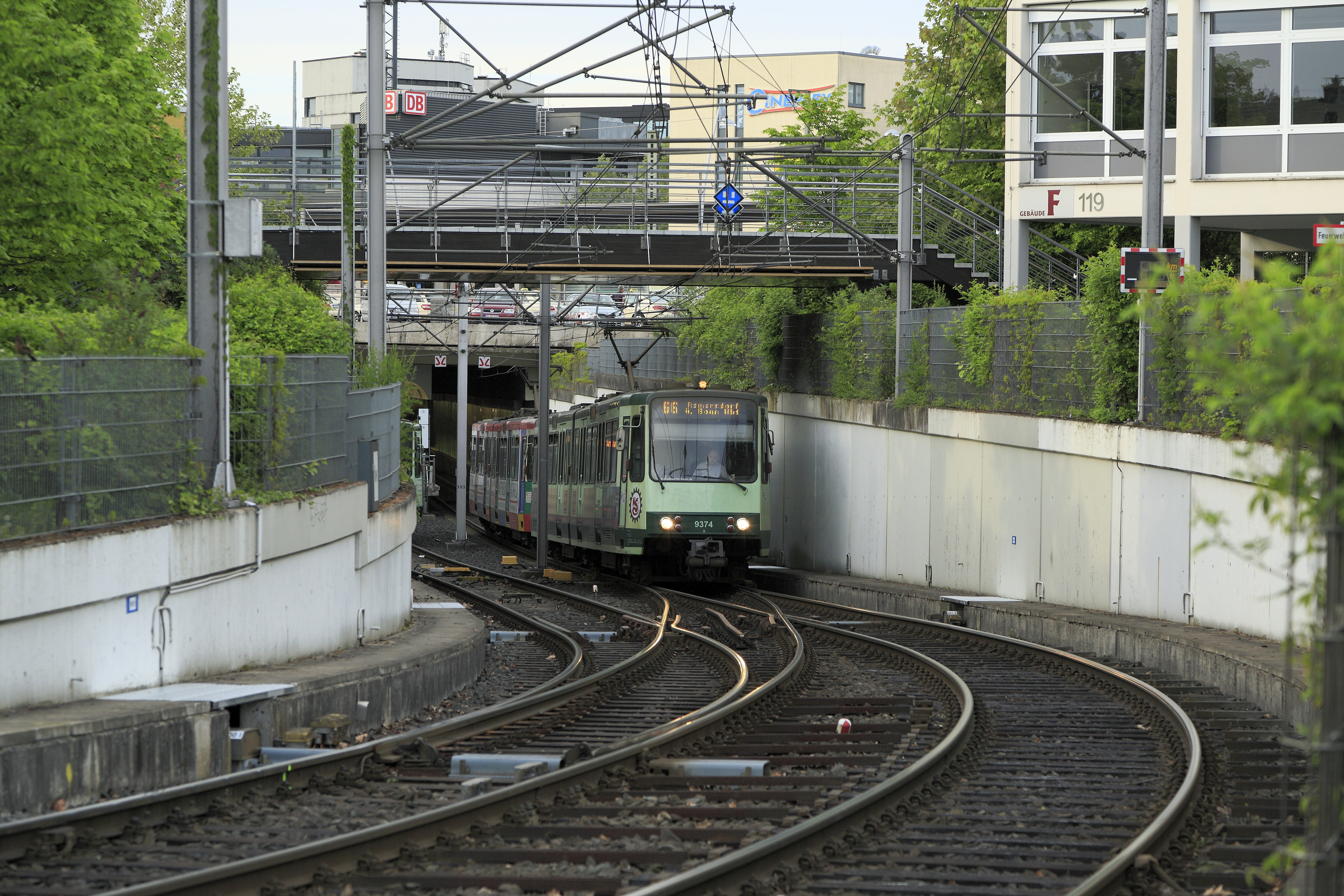 Bahnhof Siegburg/Bonn, Zug der Linie 66 nach Ramersdorf über Bonn Hbf und die Stammstrecke. Die Wagen aus den Neunzigern sind durch die fehlenden Endeinstiege gut zu erkennen.